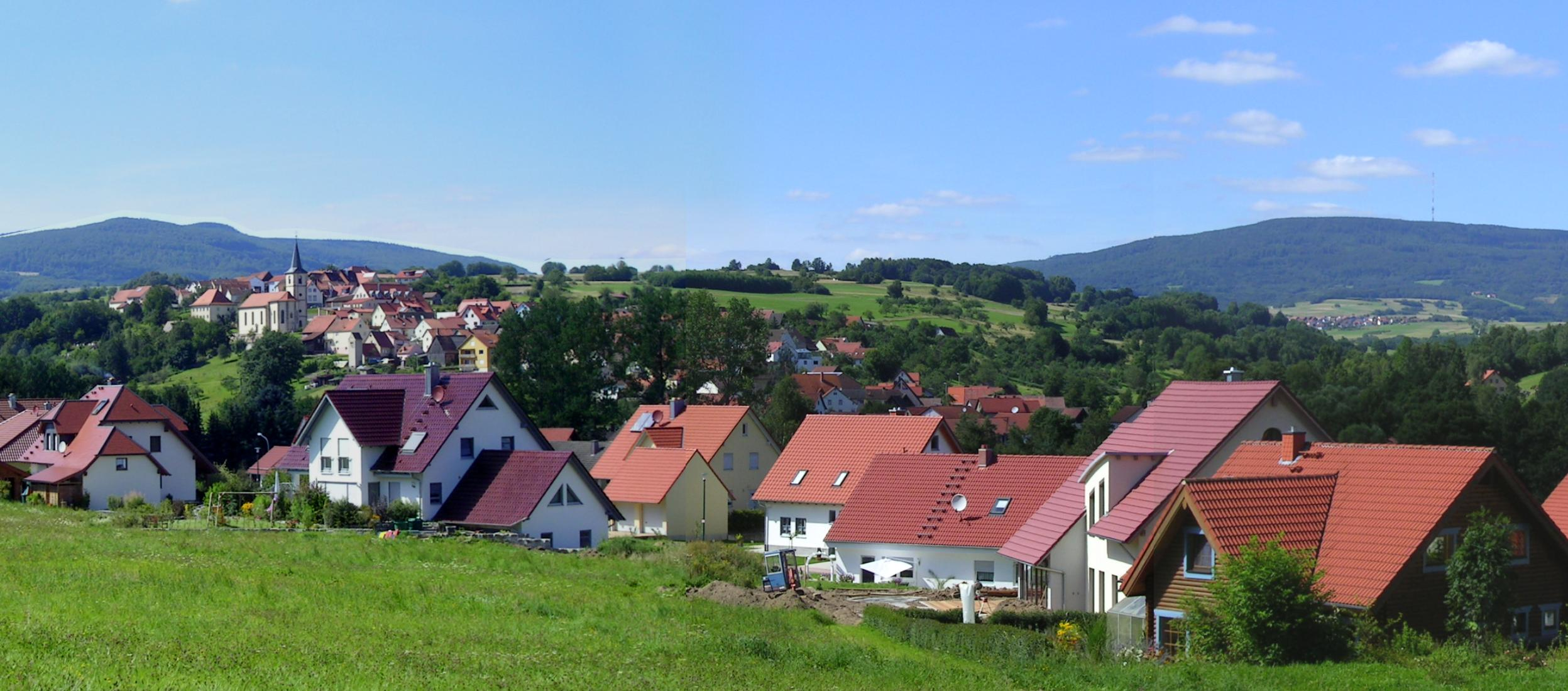 Premich